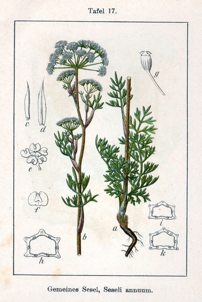 Seseli annuum L. Original Description Gemeines Sesel, Seseli annuum